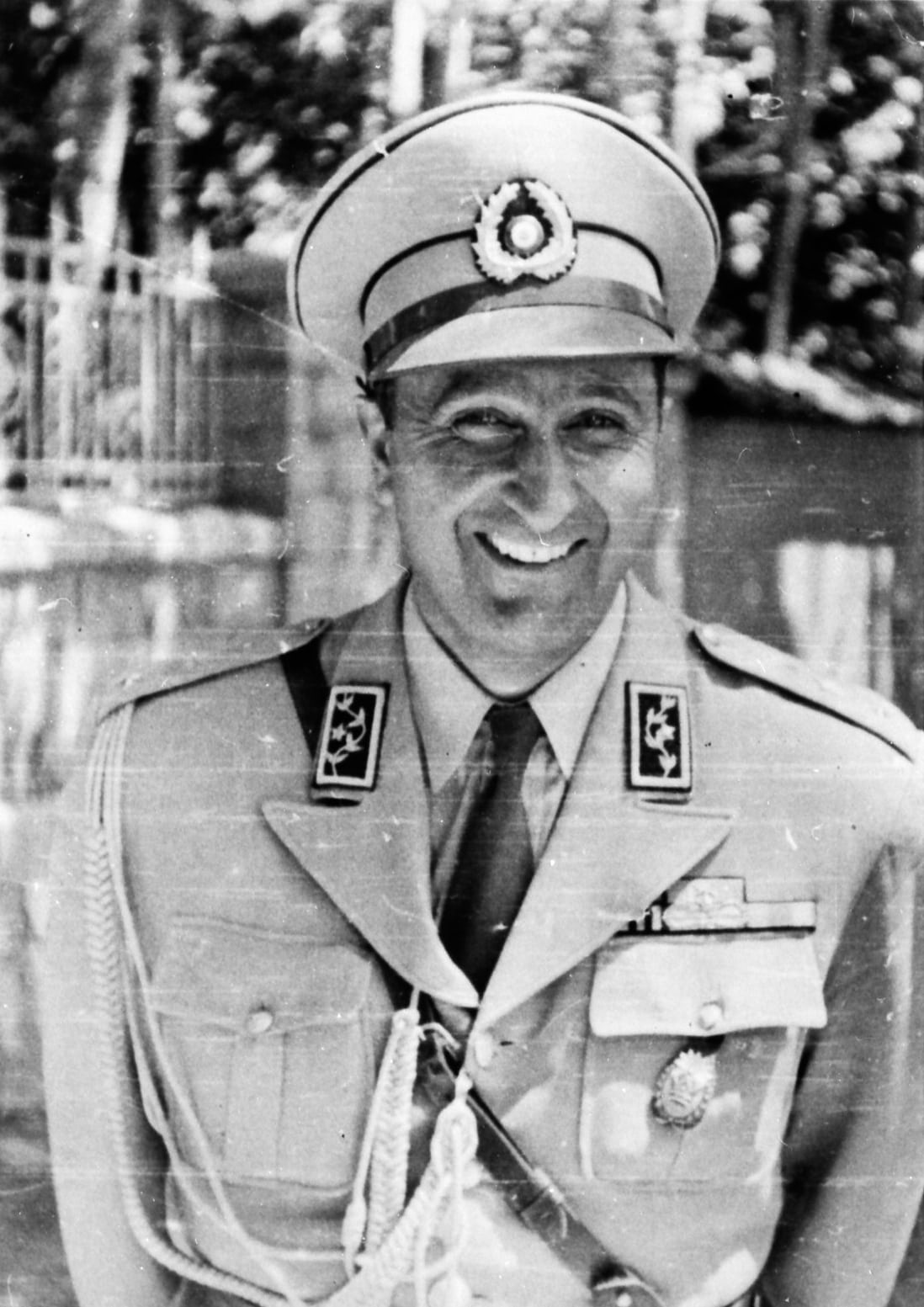 25 مرداد 1332: در نتیجه همه پرسی 1 میلیون نفر در مقابل 67 نفر به انحلاس مجلس رای دادند. دولت در نامه ای به شاه درخواست انحلال مجلس را داد. اما شاه سرپیچی کرد و محافظ خود، ارتشبد نعمت الله نصیری را با نامه ای نزد مصدق فرستاد. شاه در این نامه، فضل الله زاهدی را به نخست وزیری منصوب کرد. نصیری توسط محافظان مصدق دستگیر شد و دولت فردای آن روز اعلام کرد که کودتای سلطنت طلبان شکست خورده است.